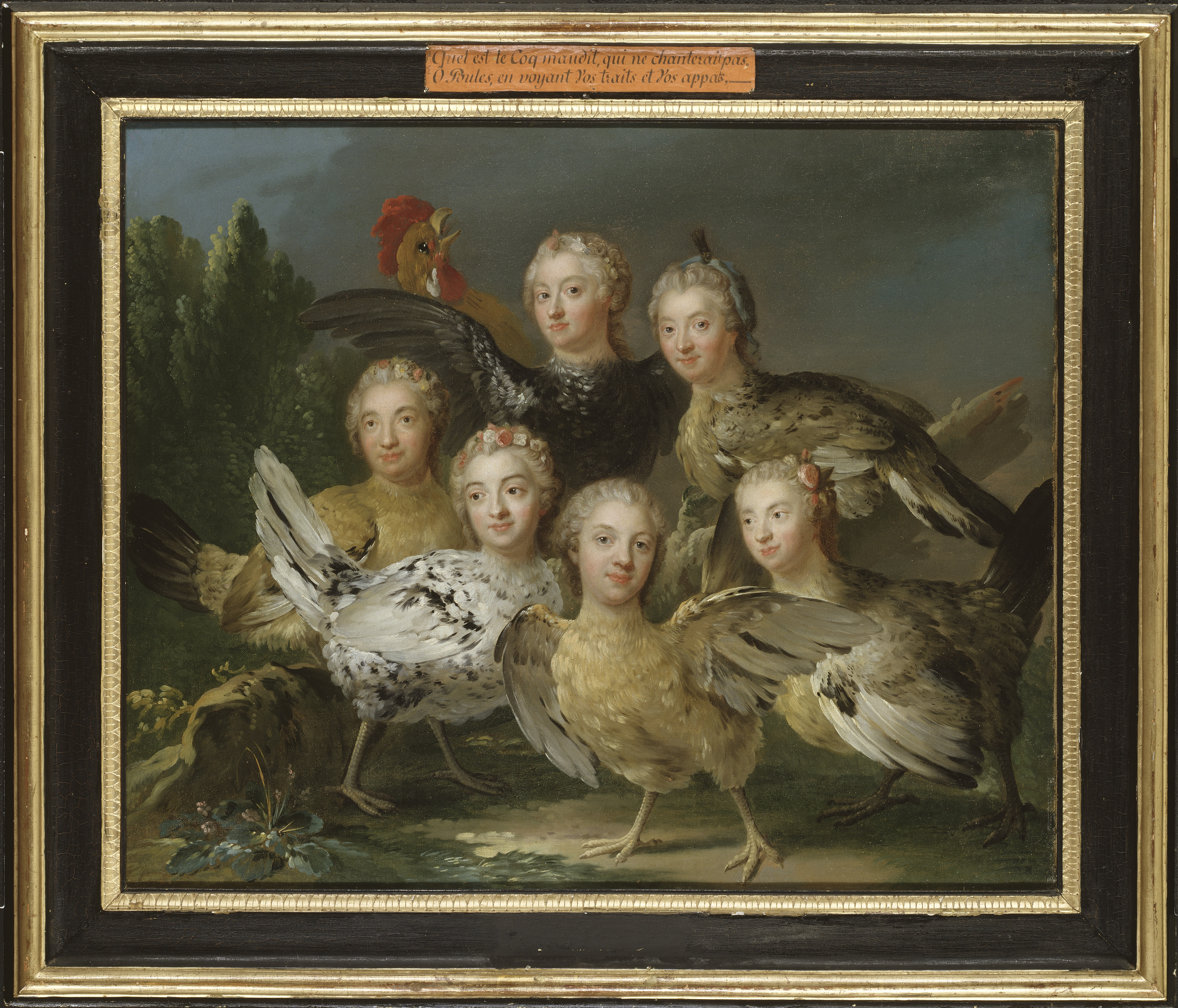 Den mångomtalade Hönstavlan tillkom på initiativ av Carl Gustaf Tessin i samband med en hovfest 1747. Målningen visades för första gången som en av sex tablåer, framförda vid ett sammanträde inom en sällskapsorden, kallad De små mästarinnors akademi. Alla de sex avbildade hovfröknarna var medlemmar i denna akademi vid kronprinsparets hov och som förlagor till deras huvuden fungerade Gustaf Lundbergs pastellporträtt för det planerade skönhetsgalleriet på Drottningholm. Den fabelmässiga framställningen alluderade på en händelse sommaren ovannämnda år, då Tessin skall ha sett hovdamerna "uti nog naturligt tillstånd, under det de skulle påkläda sig". Detta var en episod som uppenbarligen attraherade Tessins fantasi på flera plan. Han var en känd smygtittare och har själv berättat hur han lyckades öppna en badrumsdörr i smyg för att se en skymt av den vackra prinsessan av Rohan. Till Hönstavlan lät han foga ett par galanta verser där han liknade hovfröknarna vid höns och sig själv, som så oskyldigt fått se deras behag, vid en munter tupp. Målningen var alltså strängt privat till sin karaktär och endast avsedd för en trängre krets av initierade. Av samma skäl gav Tessin målningen till sig själv i julklapp 1747. Roger de Robelin (Källa: 1700-tal. Carl Gustaf Tessin på Läckö, Helsingborg 2005, s. 114)